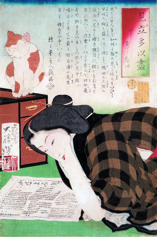 Mitatetaidukushi_Torikeshitai (『見立多以尽（みたてたいづくし）』より『とりけしたい』)